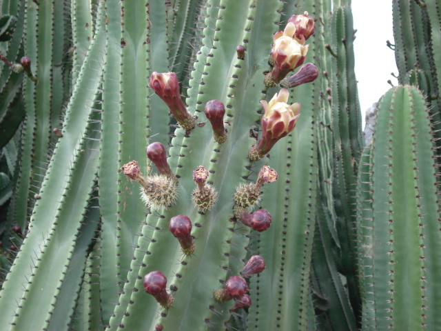 pitayo (stenocereus queretaroensis) en flor y frutos verdes